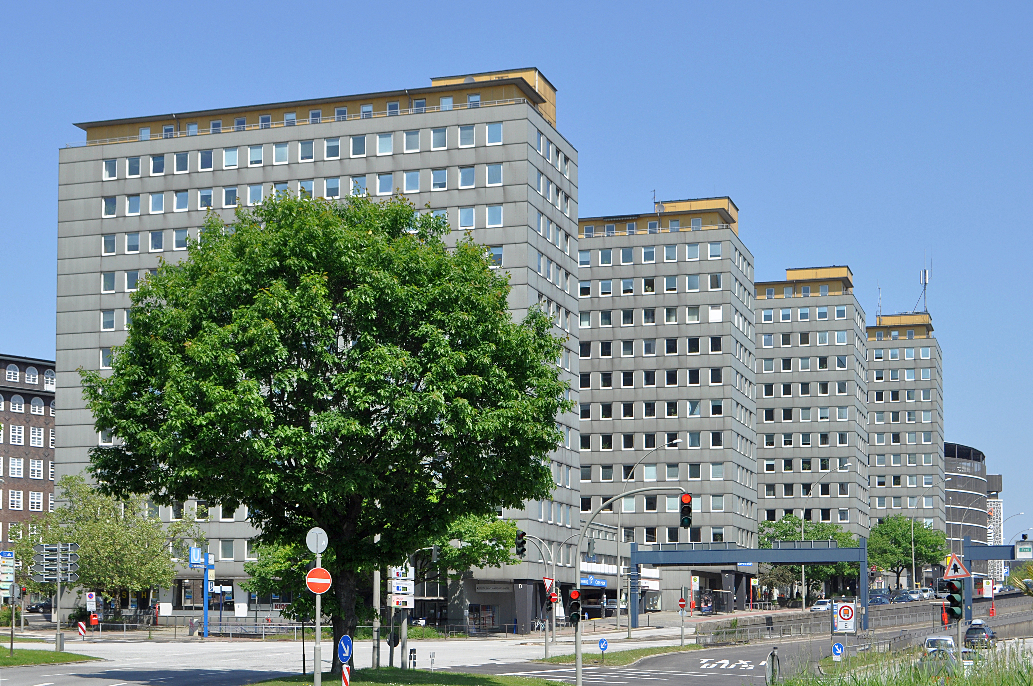 Bürogebäude City-Hof in Hamburg-Altstadt. This is a photograph of an architectural monument.